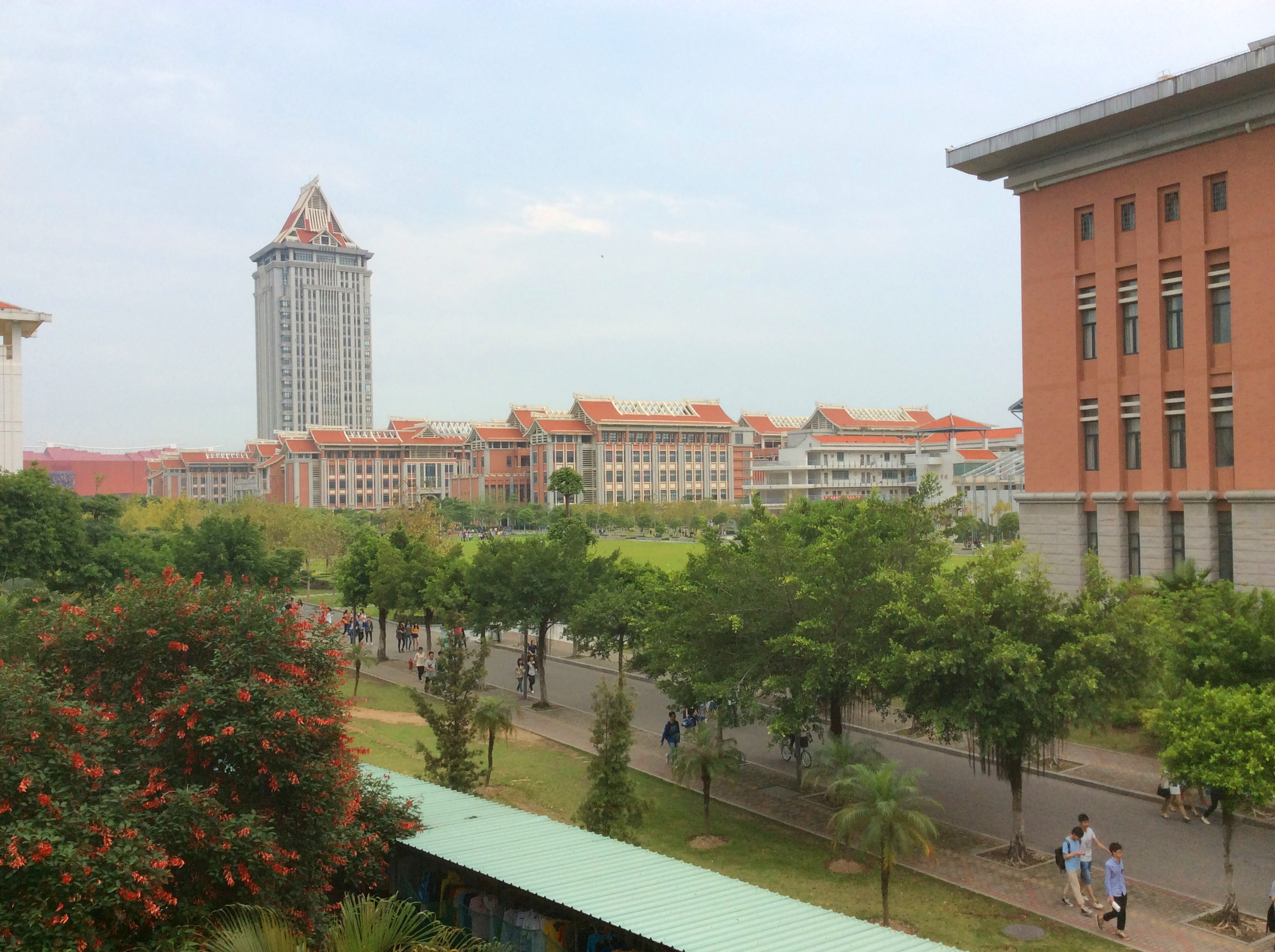 中文（中国大陆）: 集美大学新校区